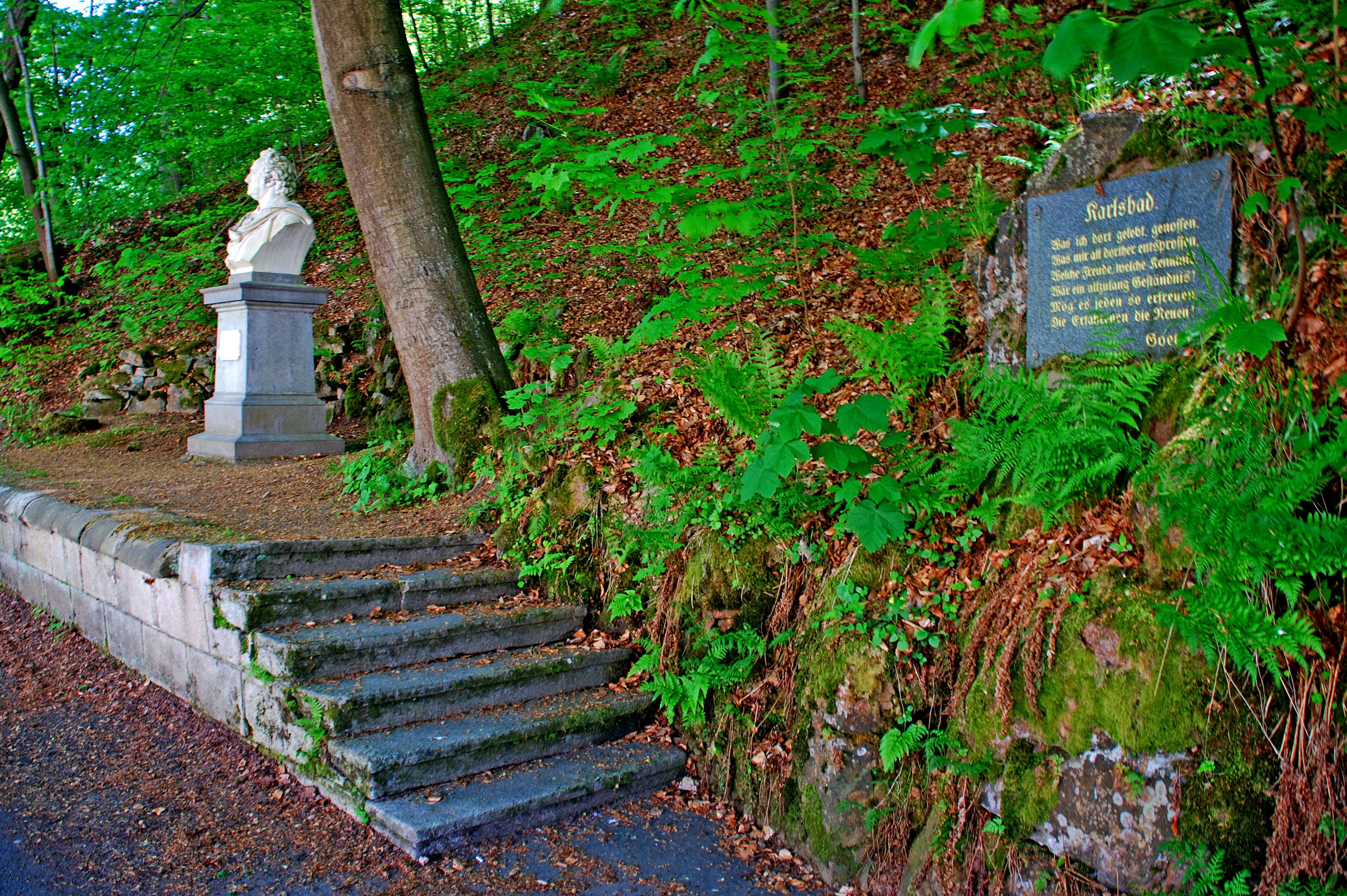 Карловы Вары